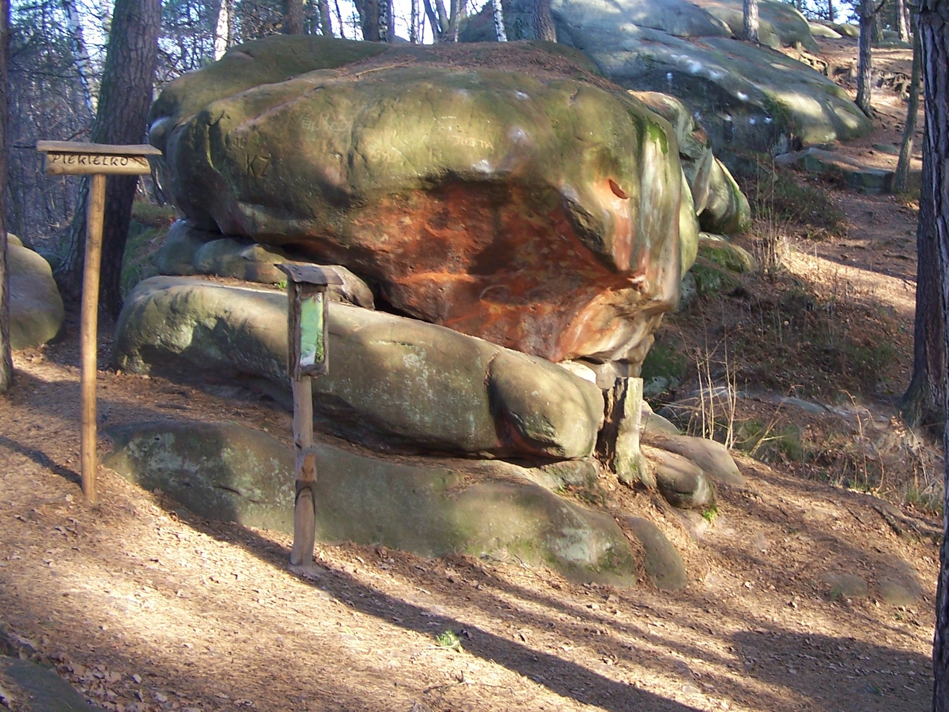 Ostaniec skalny Piekiełko w Skamieniałym Mieście w Ciężkowicach